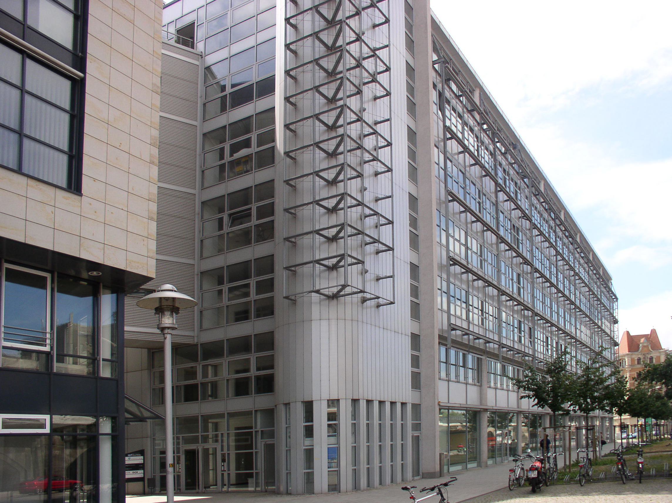 Bürogebäude, Könneritzstraße 5, Dresden, Sitz des Saxonia-Bildungsinstituts